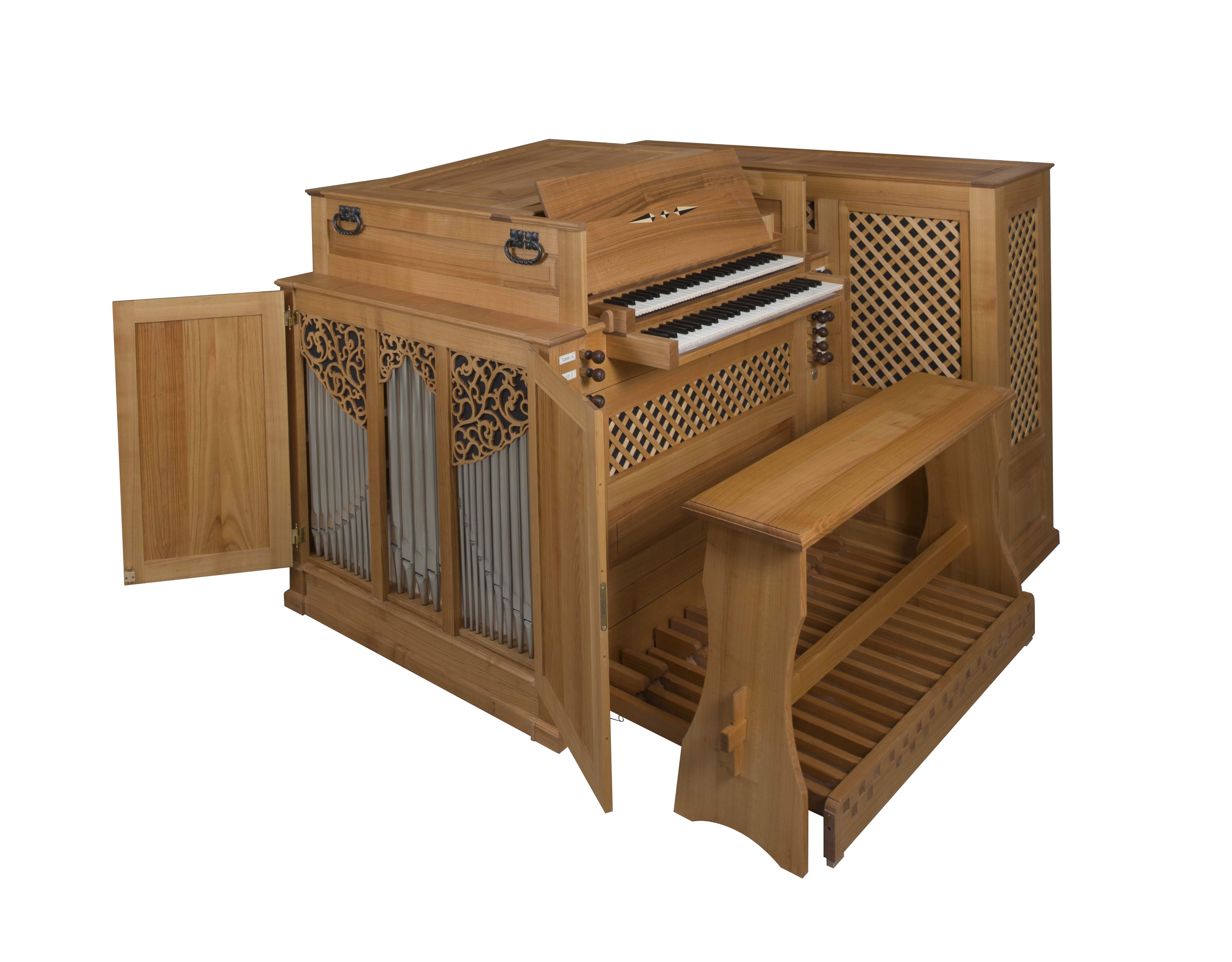 Evangelisch-reformierte Kirche Bülach, Chororgel von Peter Meier Orgelbau GmbH